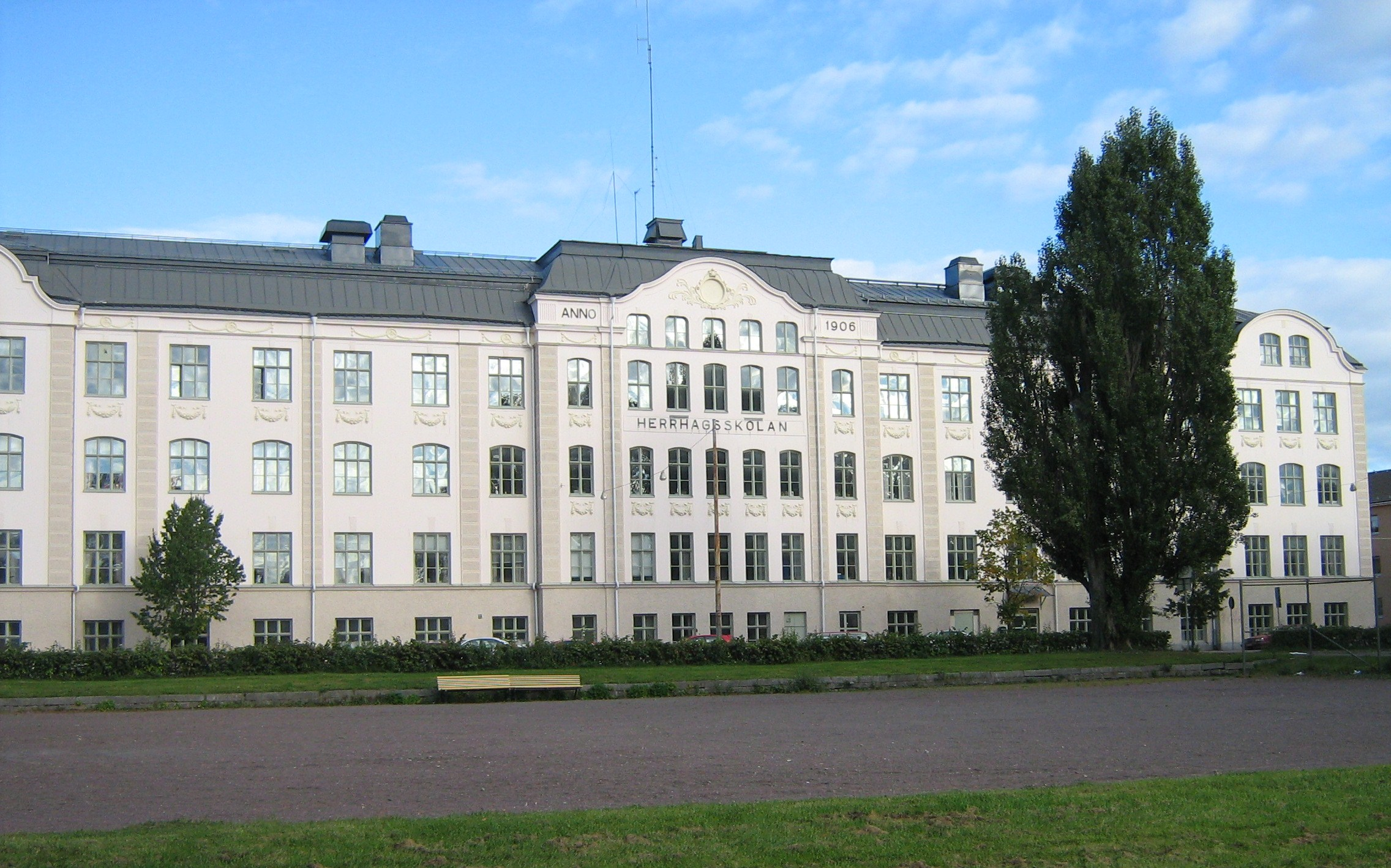 Herrhagsskolan in Karlstad. Arkitekt Carl Nissen